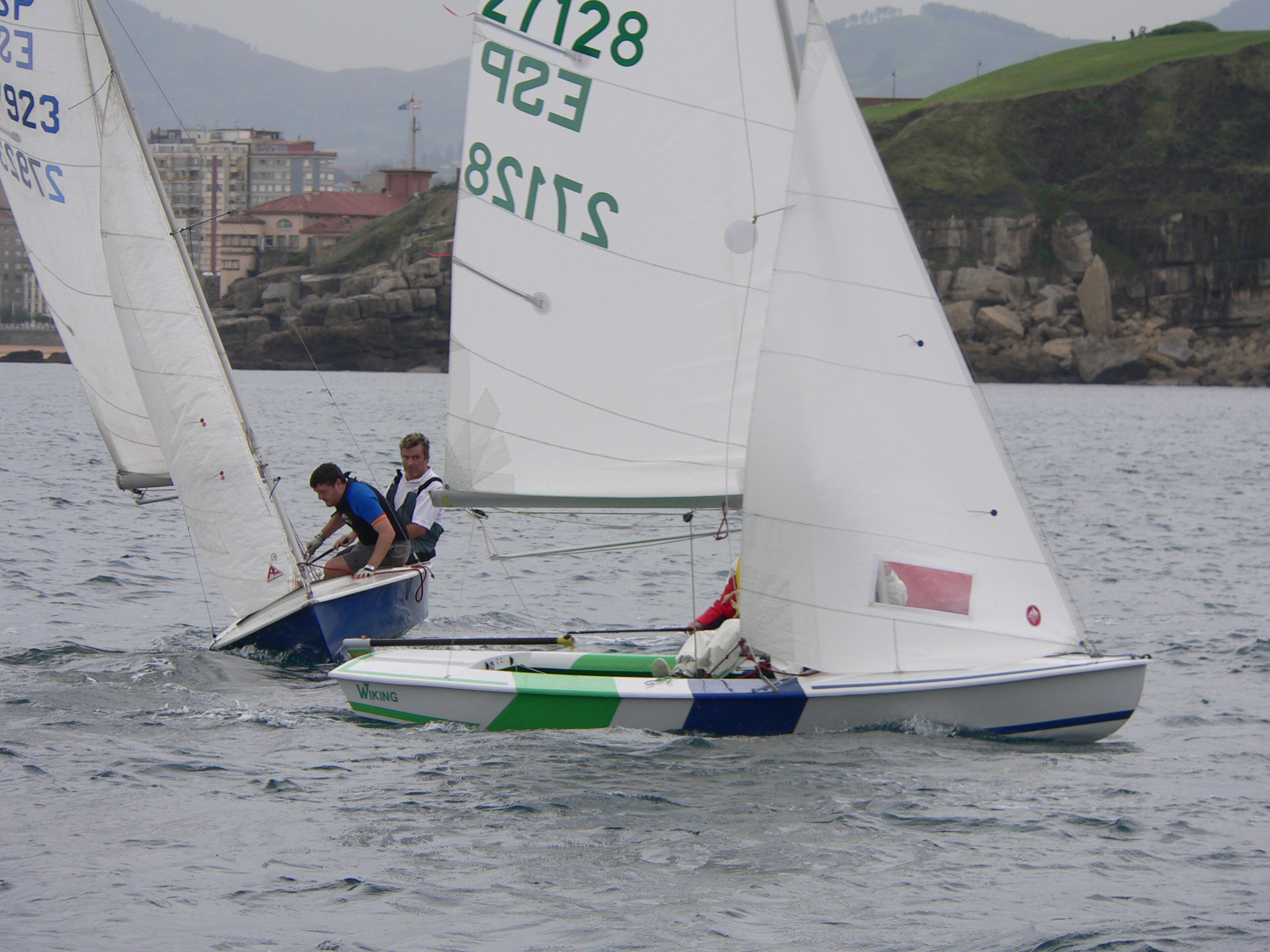 Snipe sailing RCAR